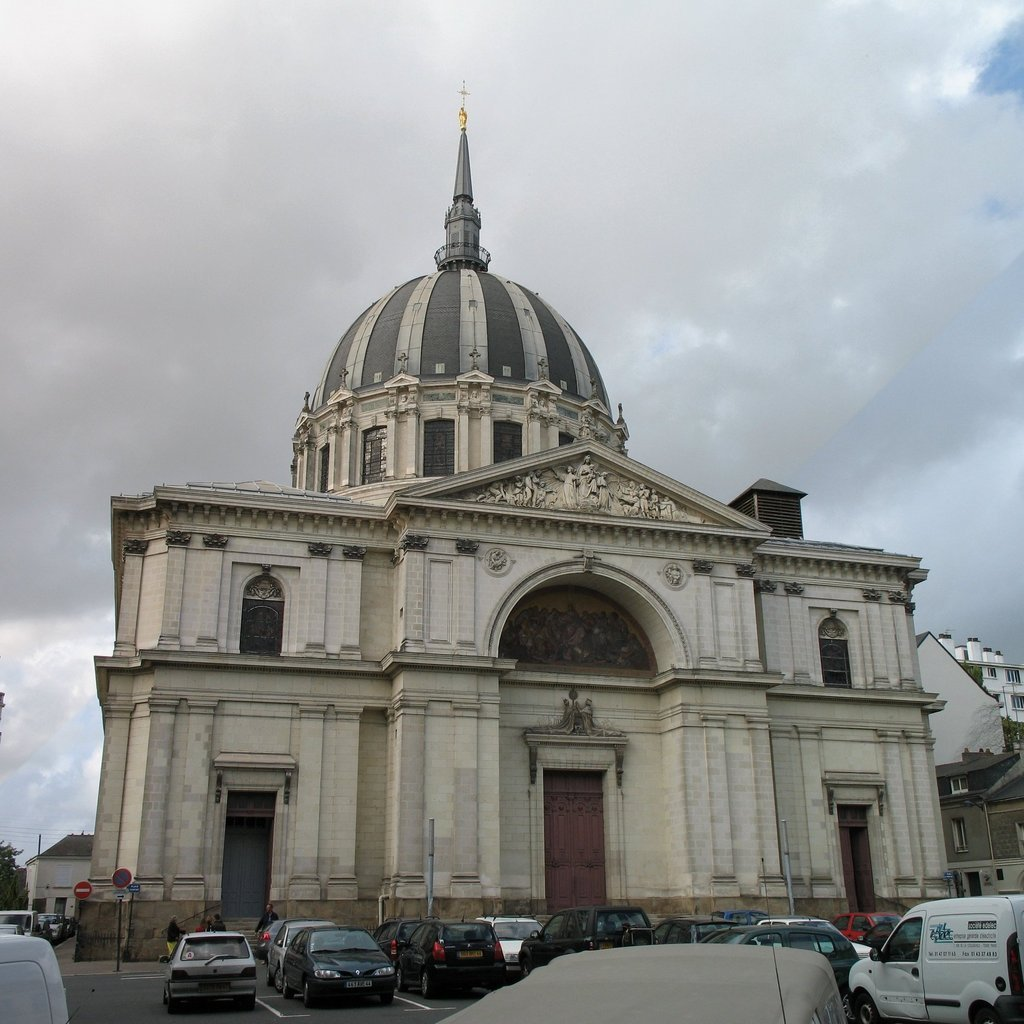 Église Notre-Dame De Bon-Port à Nantes et voitures stationnées sur la place du Sanitat